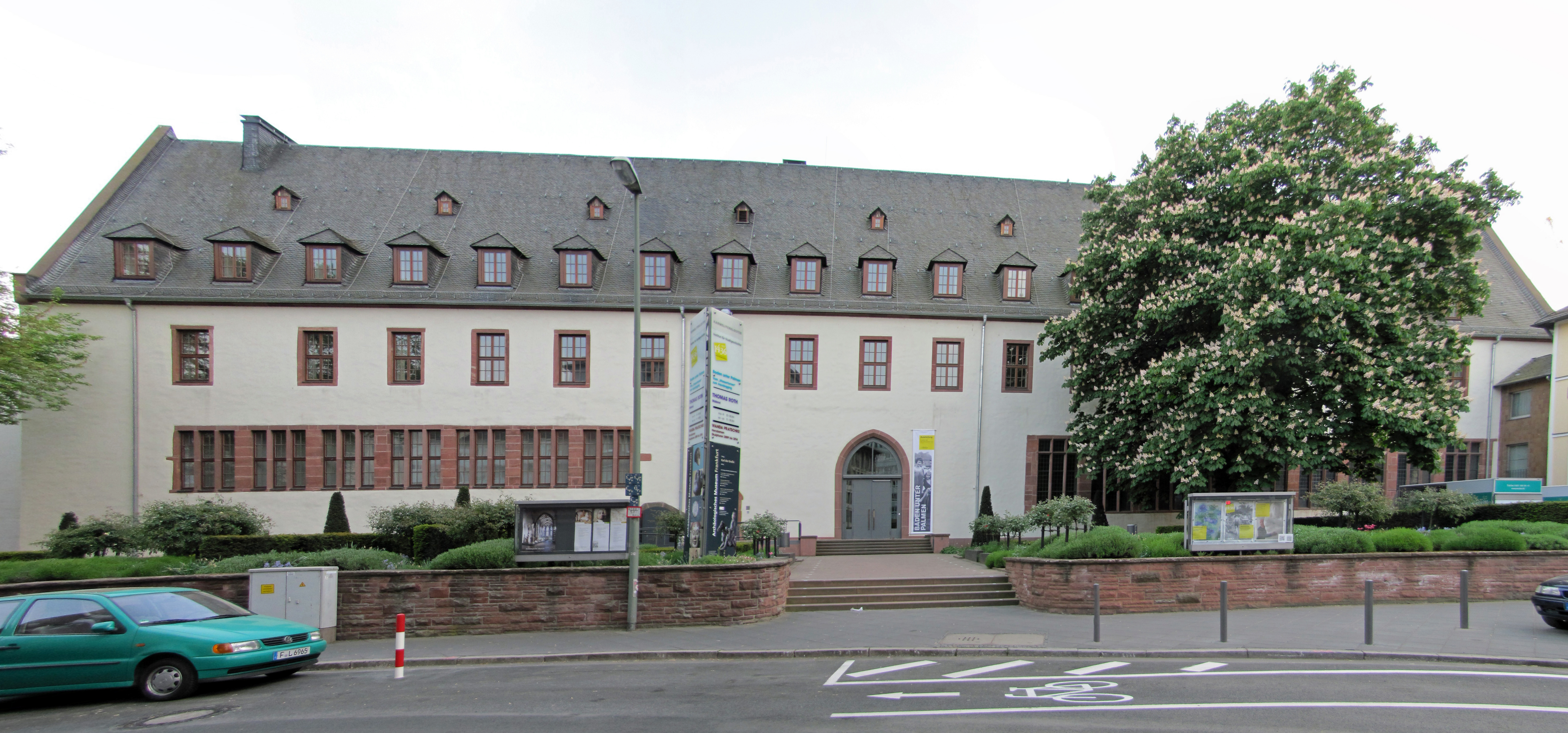 Das Karmeliterkloster in Frankfurt am Main - Altstadt, Eingang Nordseite, an der Weißfrauenstrasse.